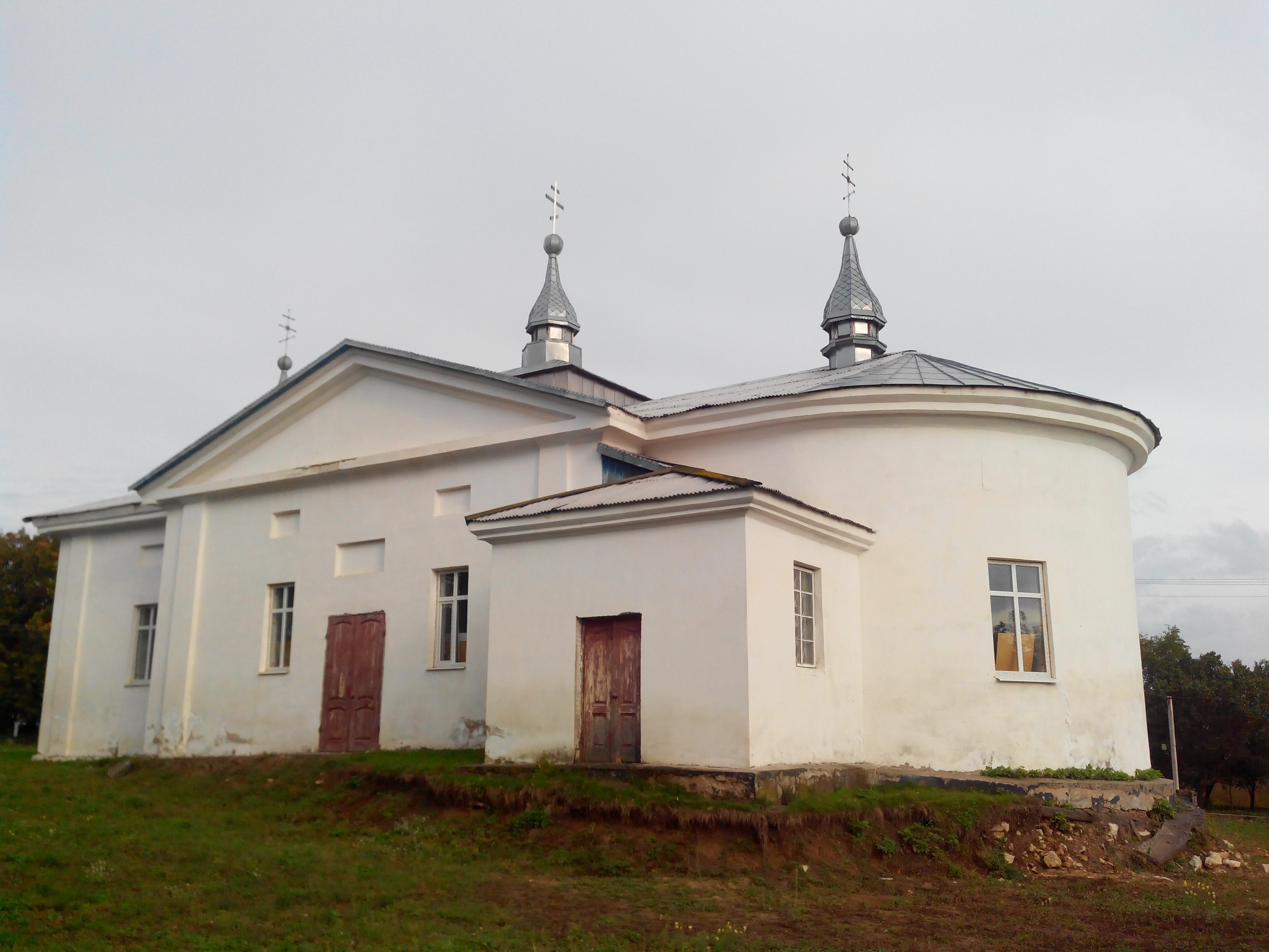 Свято-Покровська церква, Новоархангельський район, с. Нерубайка